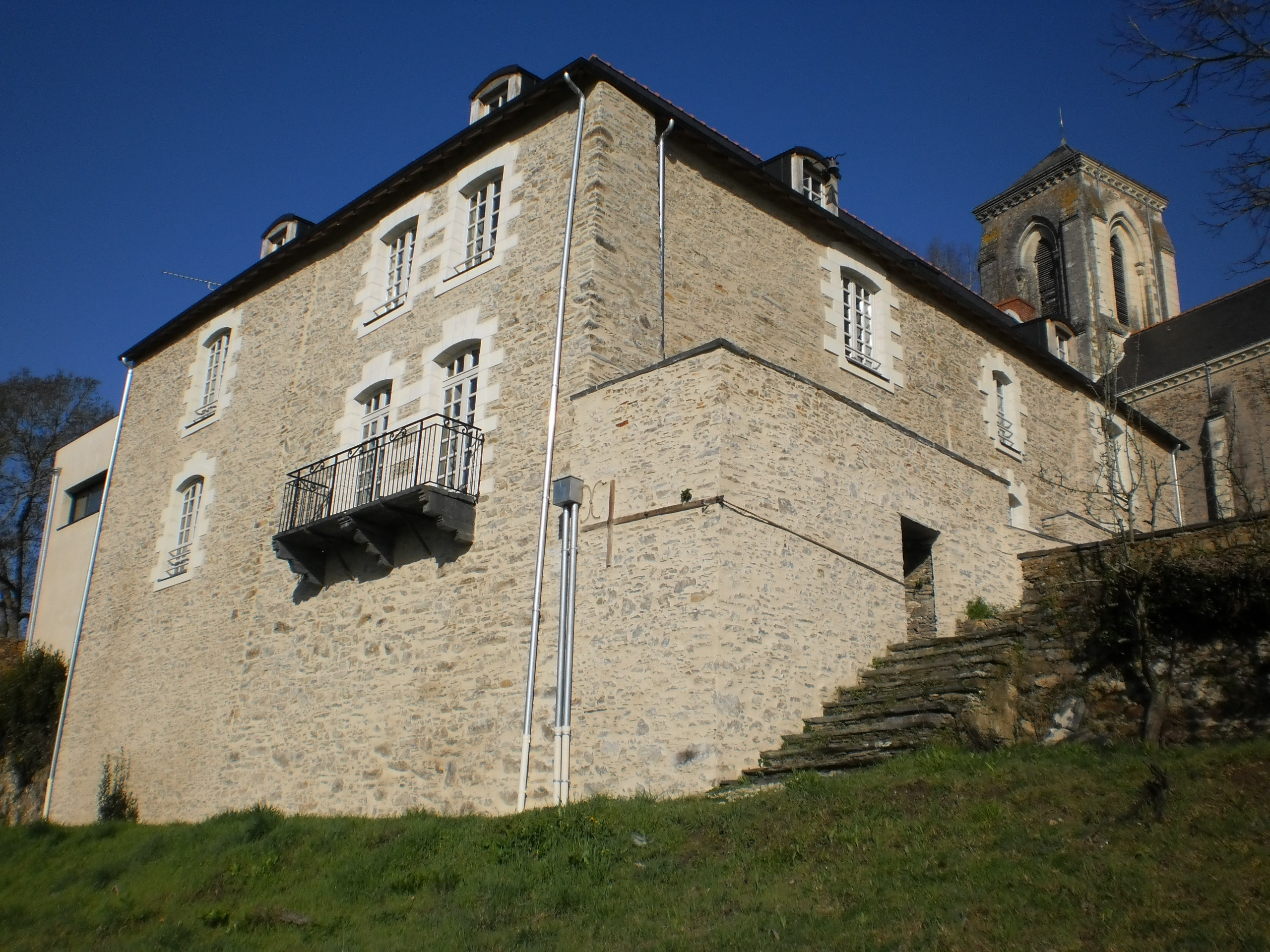 Bonnoeuvre (Loire-Atlantique, France) - ancien prieuré